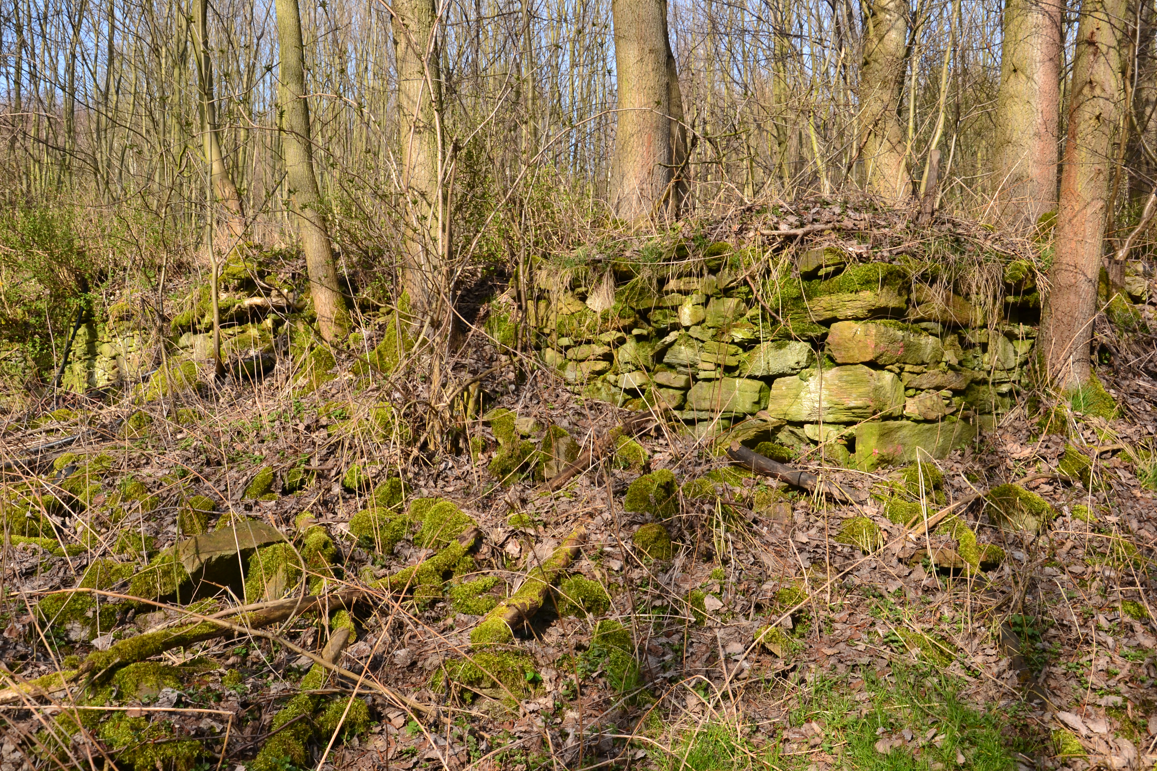 Fragmenty zdiva domů